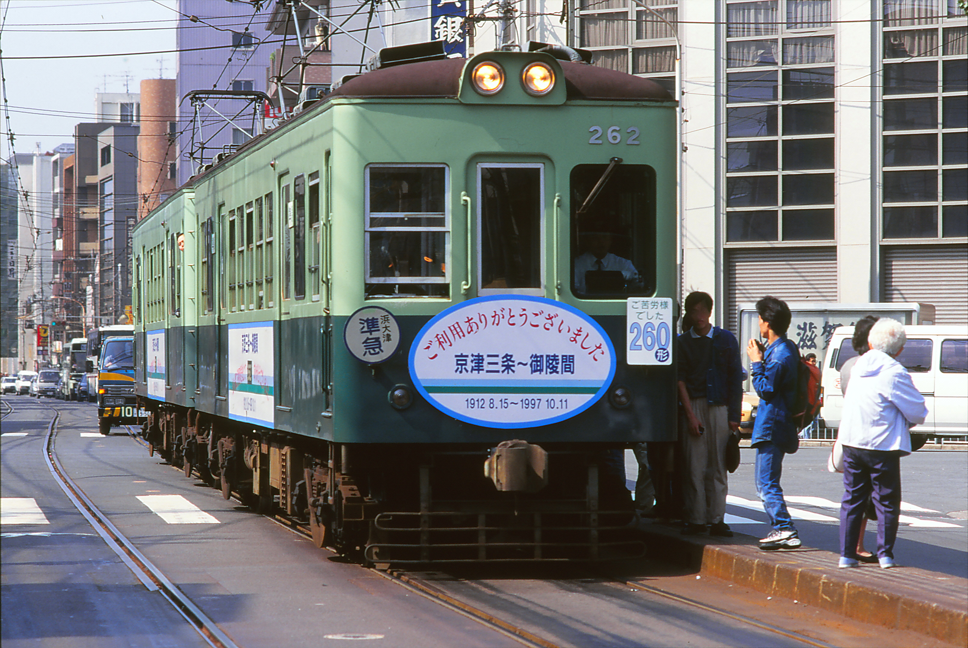 東山三条駅 右後方は滋賀銀行 駅は東山三条交差点東側